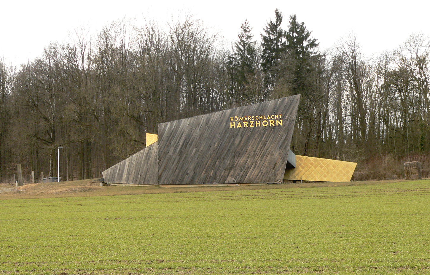 Harzhorn Infogebäude von Bundesstraße